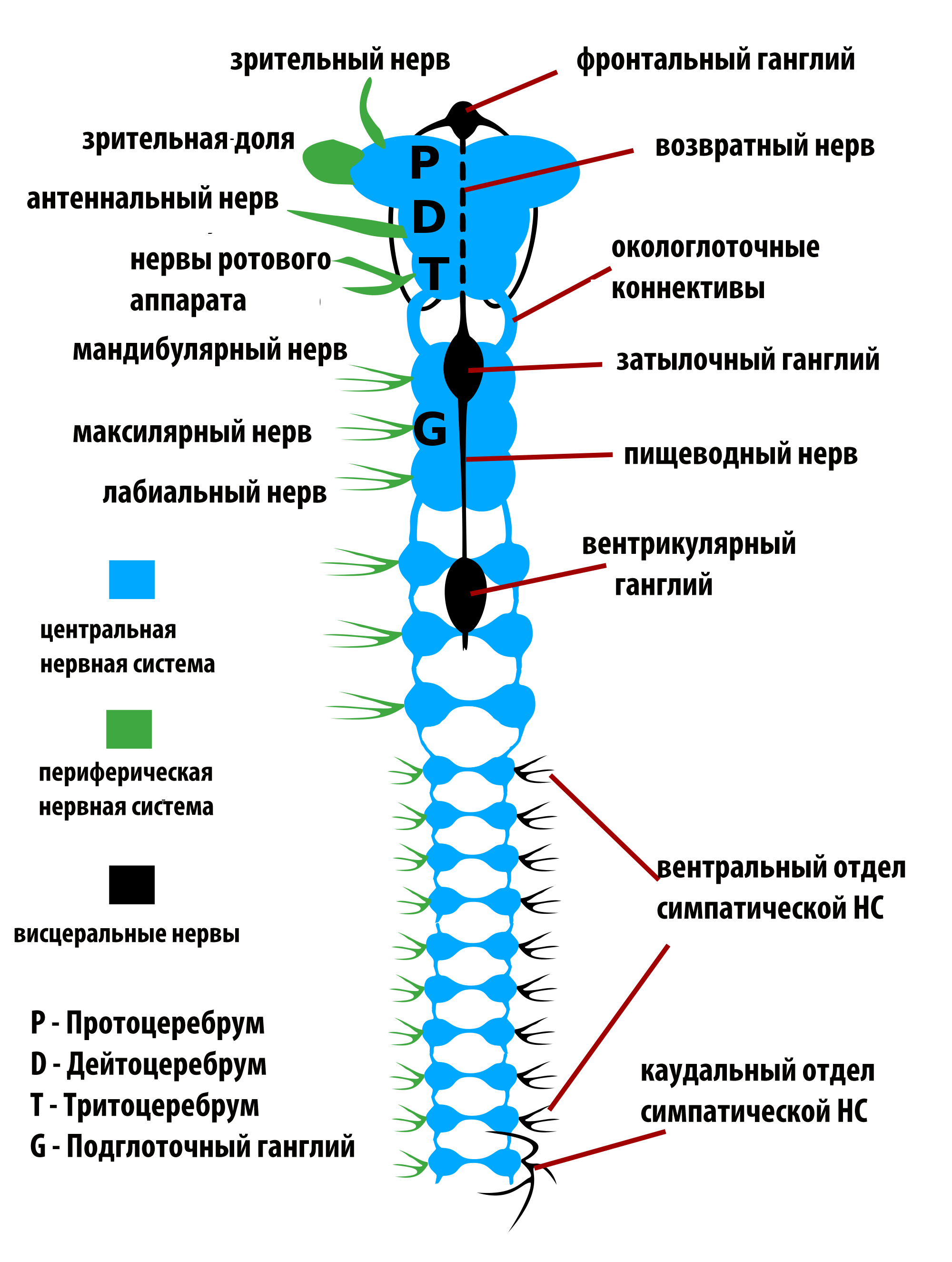 Representación esquemática del sistema nervioso de los insectos. Leyenda: P: Protocerebro, D: Deutocerebro, T: Tritocerebro, G: Ganglio subesofágico, CV: Cordón nervioso ventral